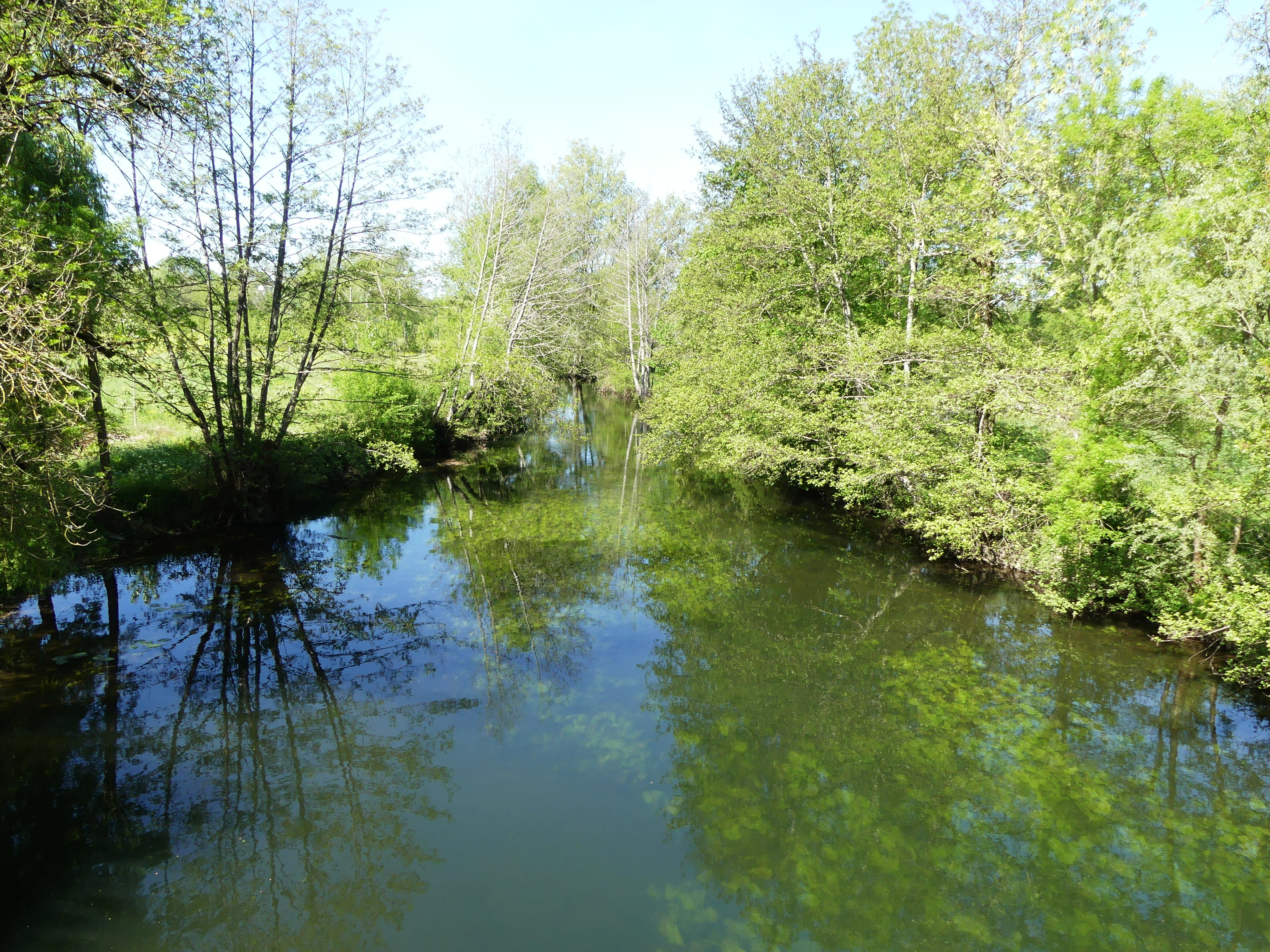 L'attier (bras secondaire) de la Dronne au pont de la route départementale 708, Villetoureix, Dordogne, France. Vue prise en direction de l'aval.